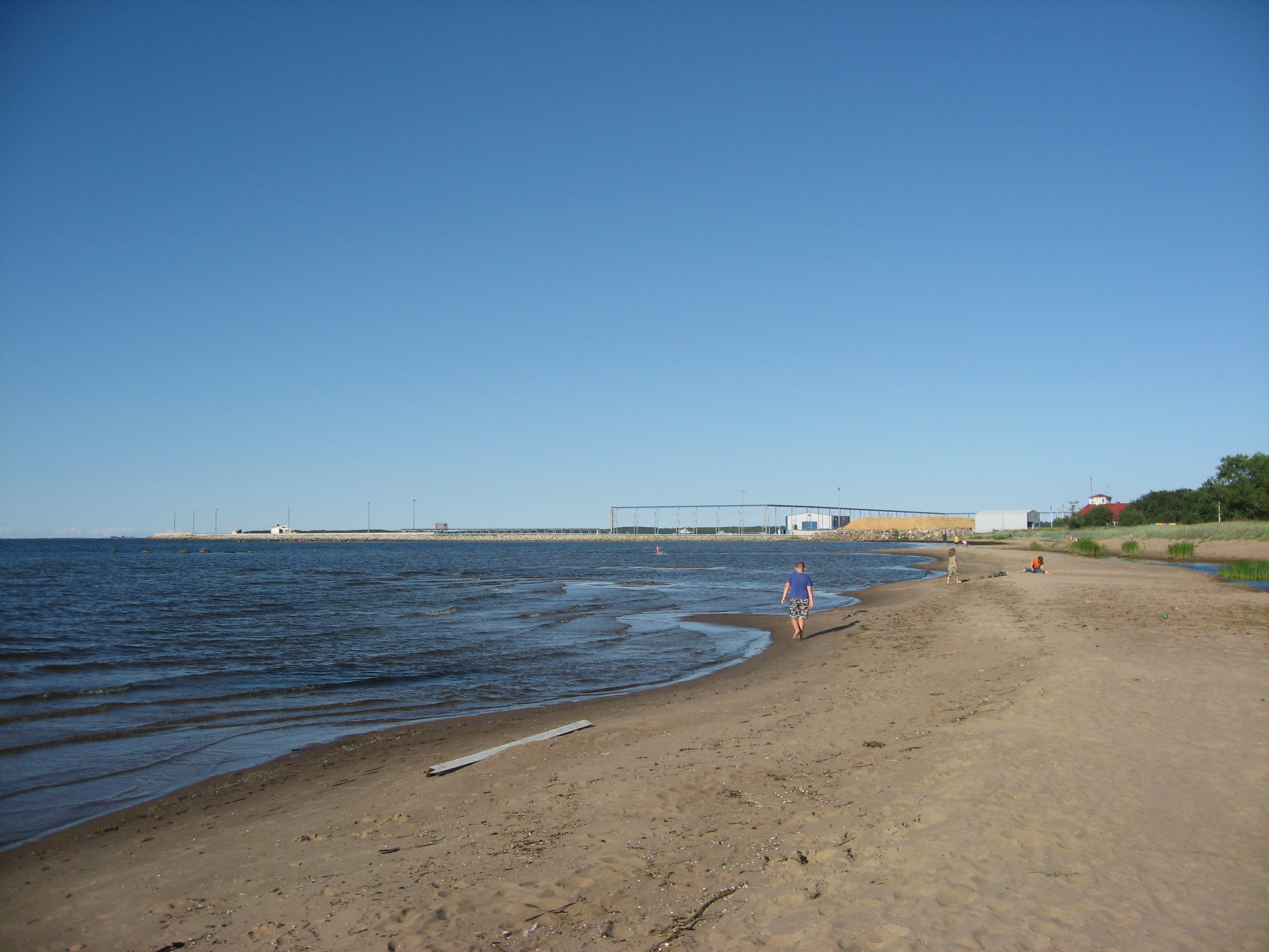 Kunda, pláž u Baltského moře